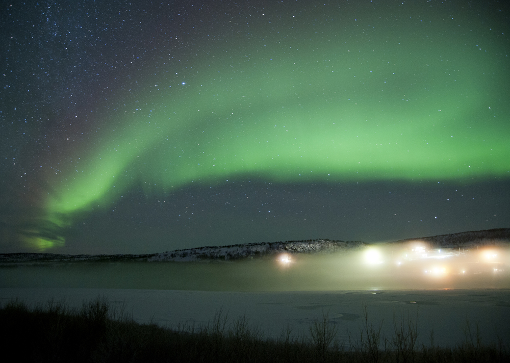 Norrsken i Nuorgam, Utsjoki, fotograferat över Tana älv mot Norge.